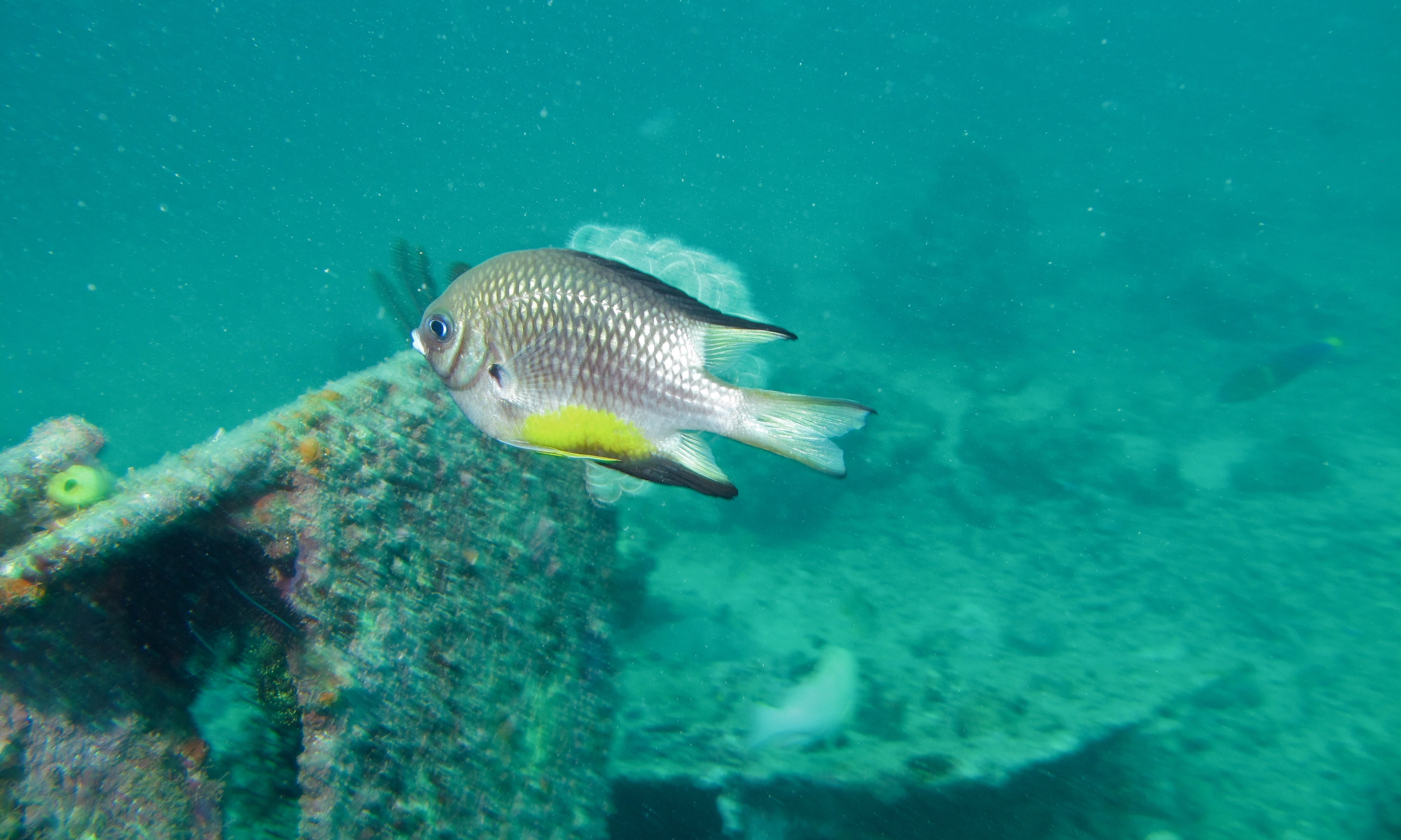 Mabul Seaventure, Pulau Mabul, Sabah, MALAYSIA